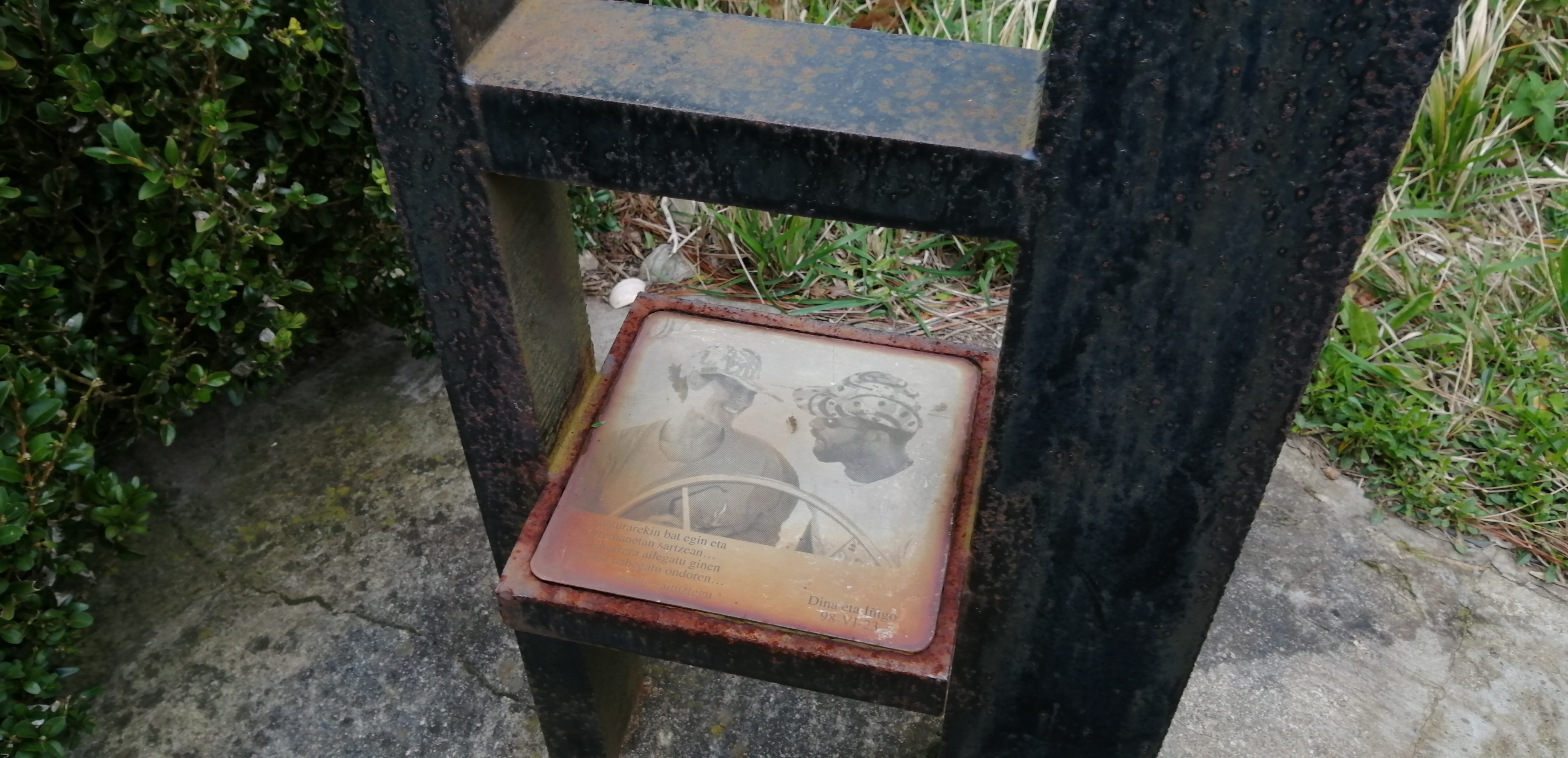 Dina Bilbao eta bere bikotearen omenezko oroigarroa Akilla mendian